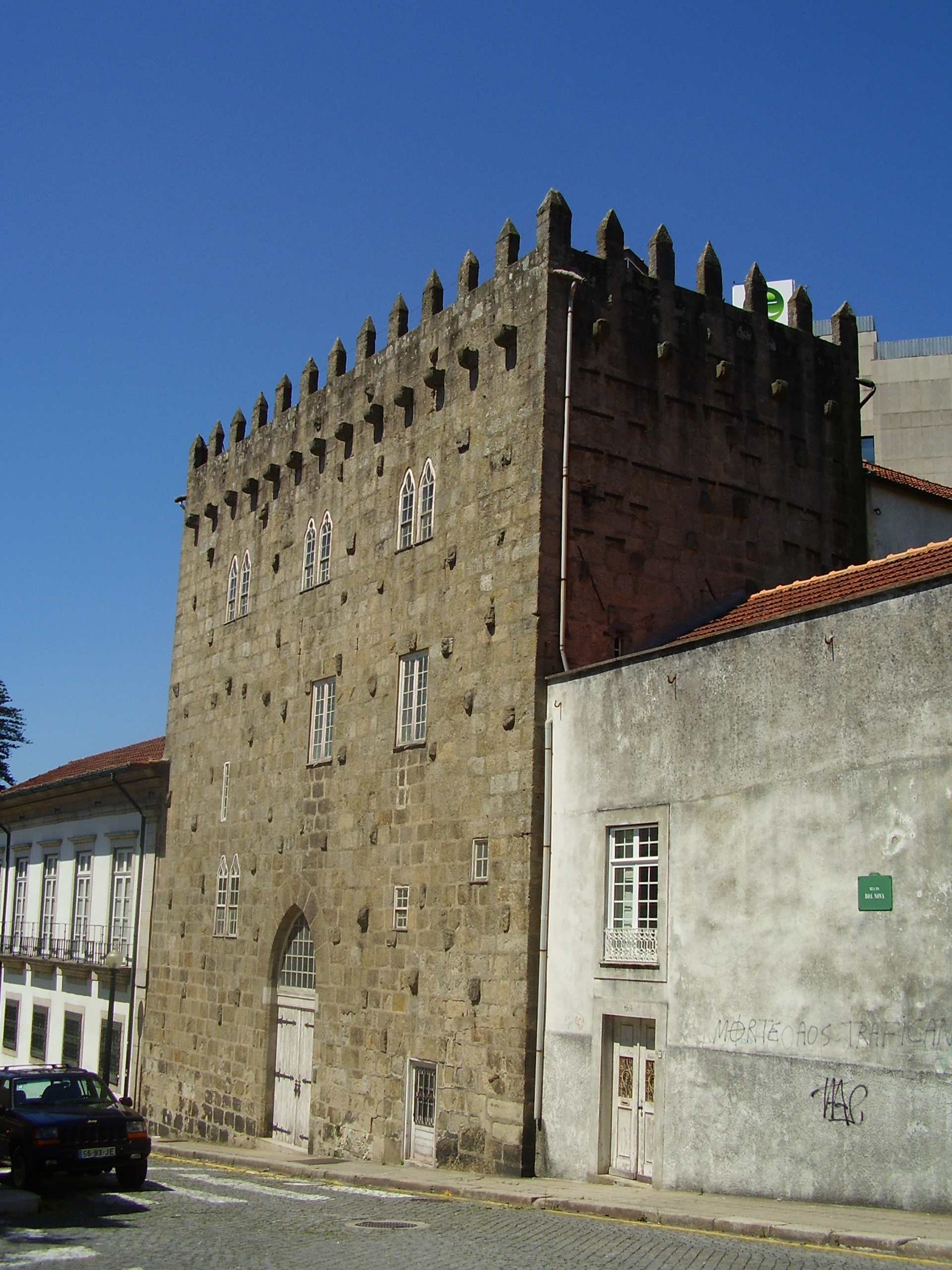 Torre de Pedro Sem